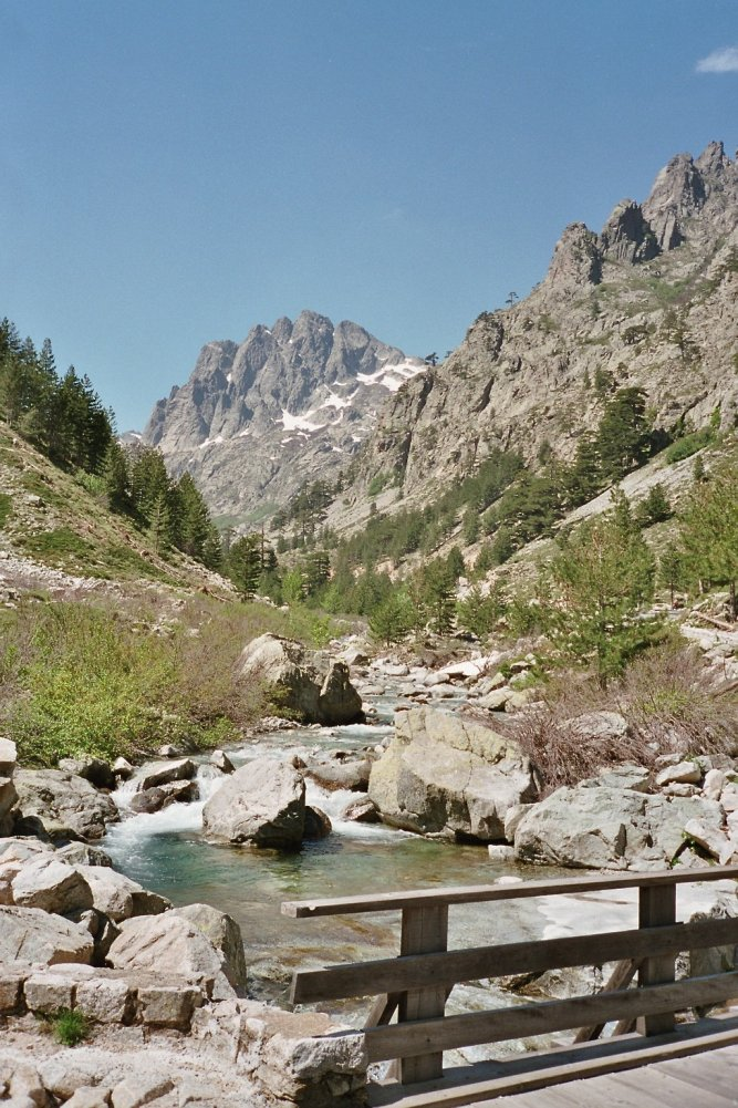 Die Restonica-Schlucht auf Korsika